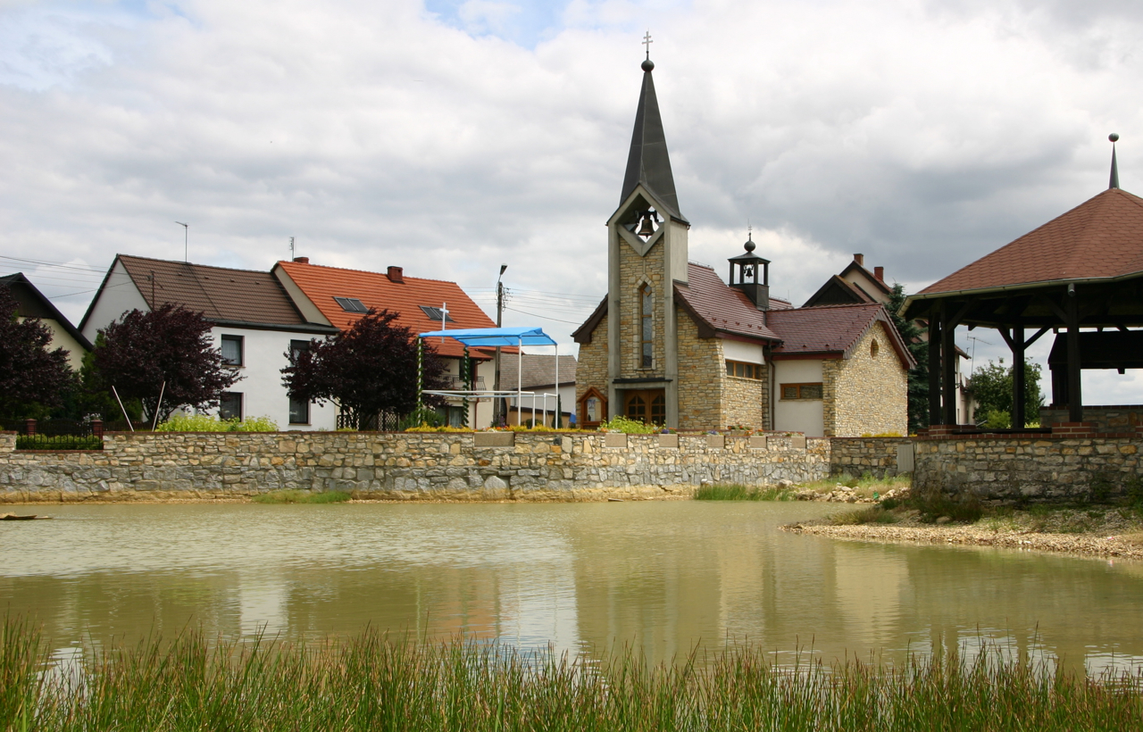 Kamionek (dodatkowa nazwa w j. niem. Klein Stein) – wieś w Polsce położona w województwie opolskim, w powiecie krapkowickim, w gminie Gogolin.